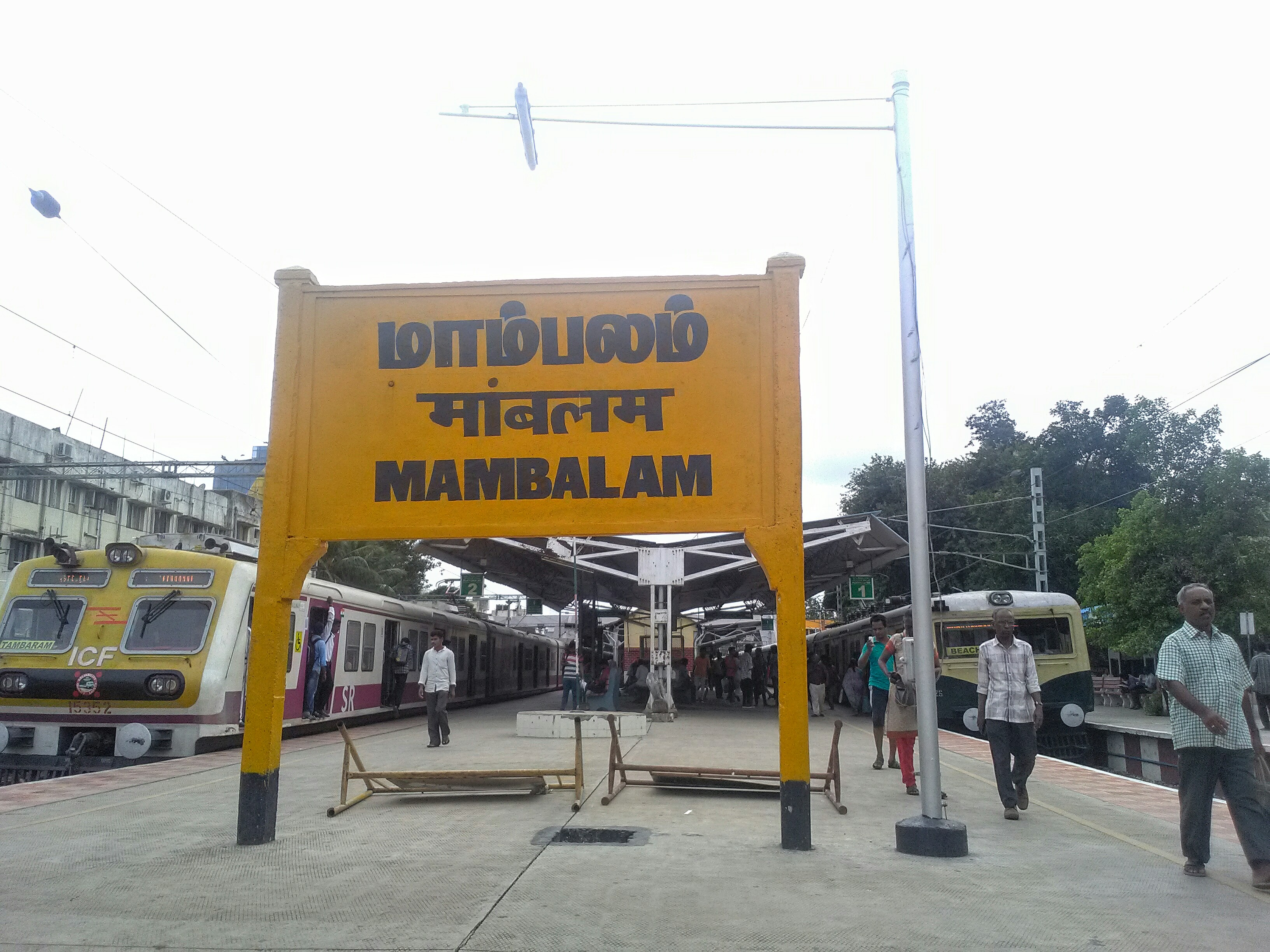 மாம்பலம் இரயில் நிலையத்தில் எடுக்கப்பட்ட புகைப்படம்